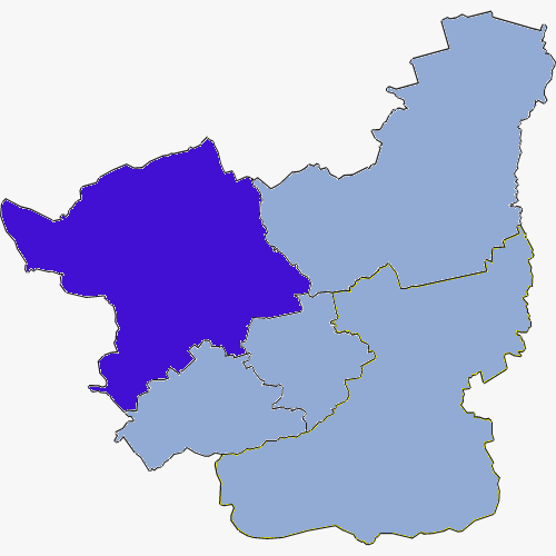 Powiat strzelecko-drezdenecki - Gmina Strzelce Krajeńskie